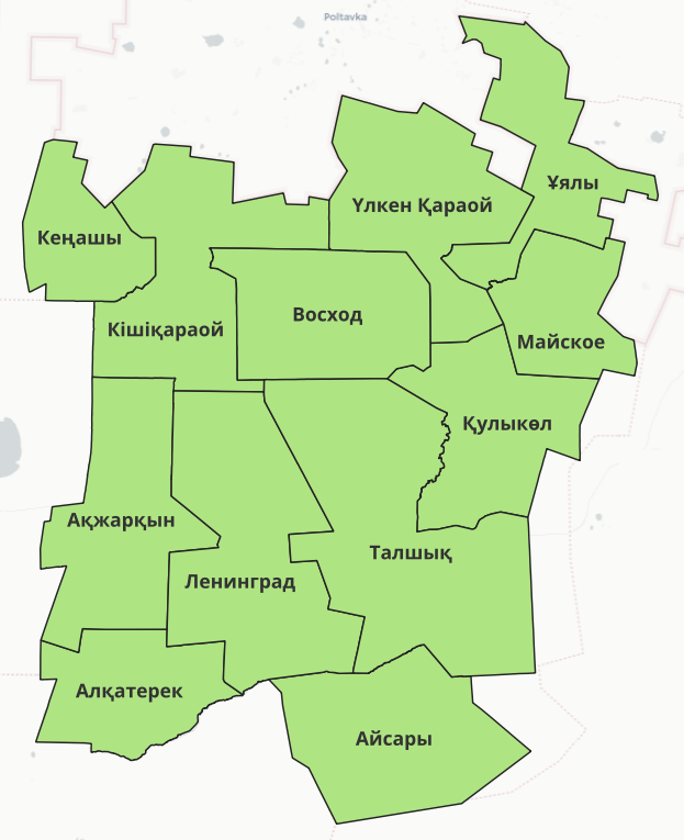 Схема АТП Акжарського району Північно-Казахстанської області